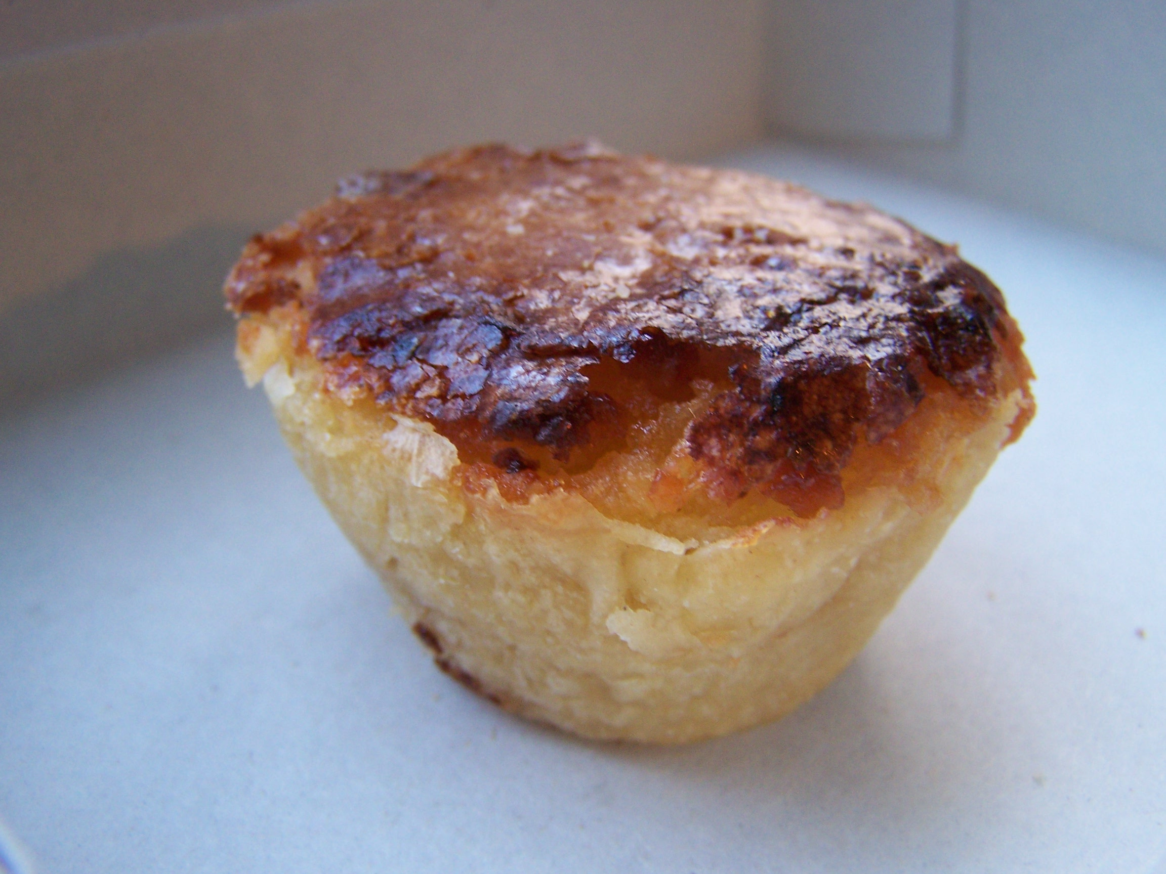 Pastel de feijão, doce típico de Torres Vedras, Portugal.